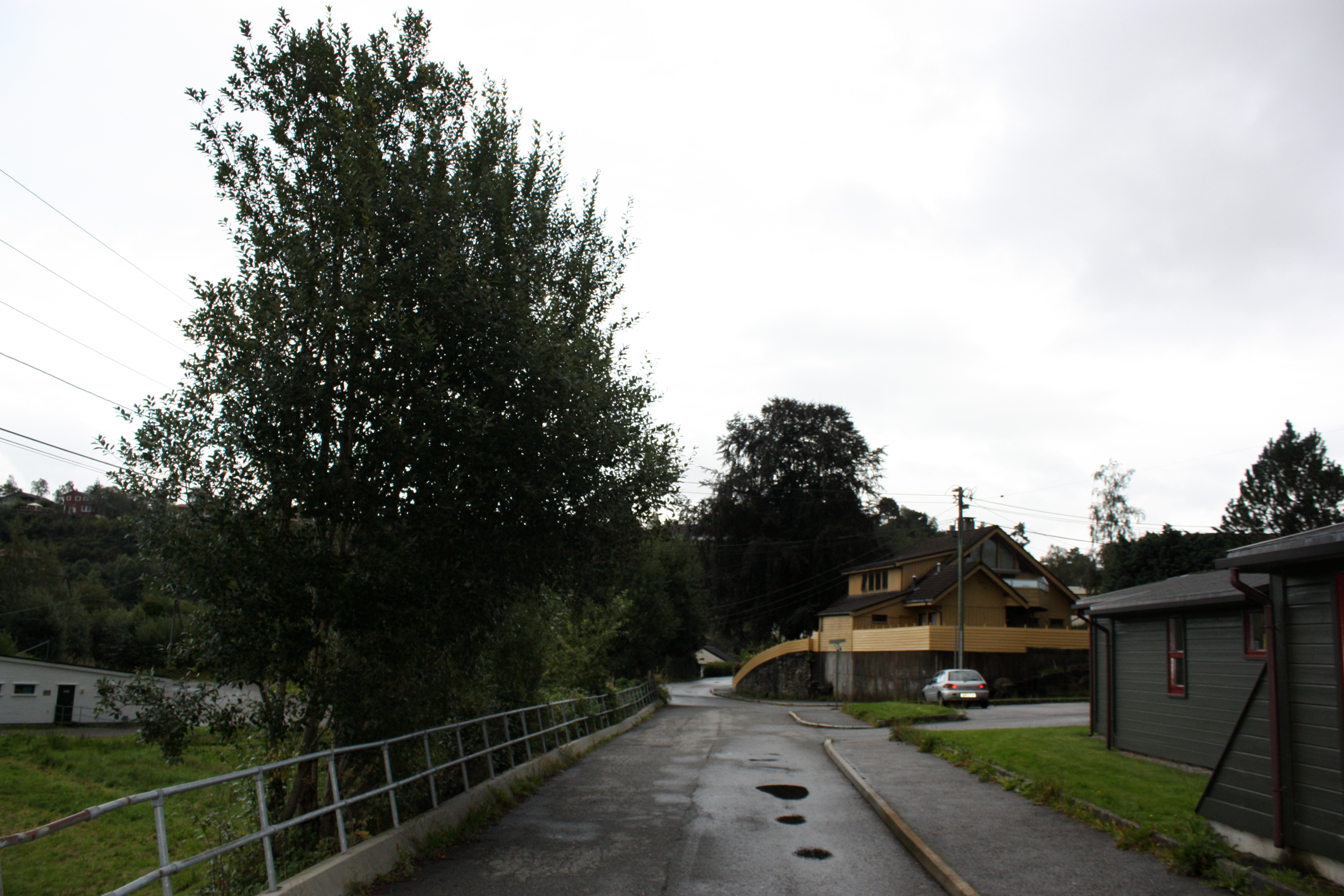 Tors veg, Fana, Bergen.